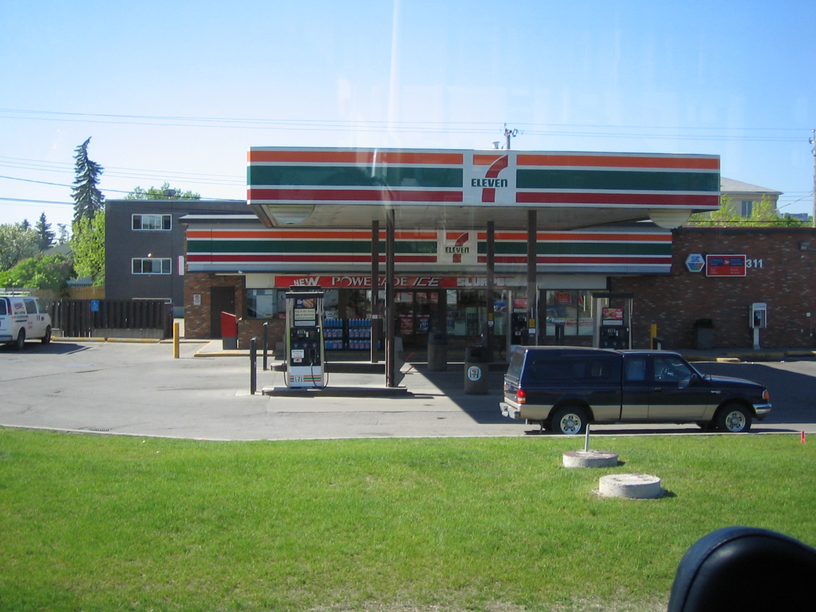 カナダ、アルバータ州カルガリーにおいて撮影。ガソリンスタンドとコンビニ（セブンイレブン）が併設されている。